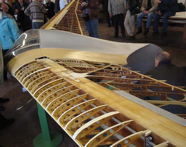 Horten H.VI bei einer Präsentation am 21.2.2004 nach der Restaurierung durch das Deutsche Technikmuseum Berlin